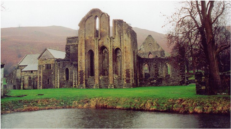 Abaty Glyn y Groes, Llangollen. Cefn.